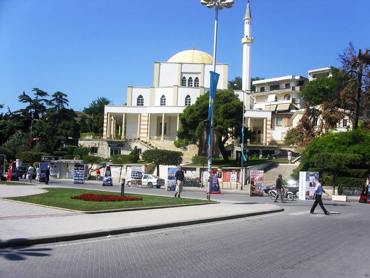 Durrësi në gusht